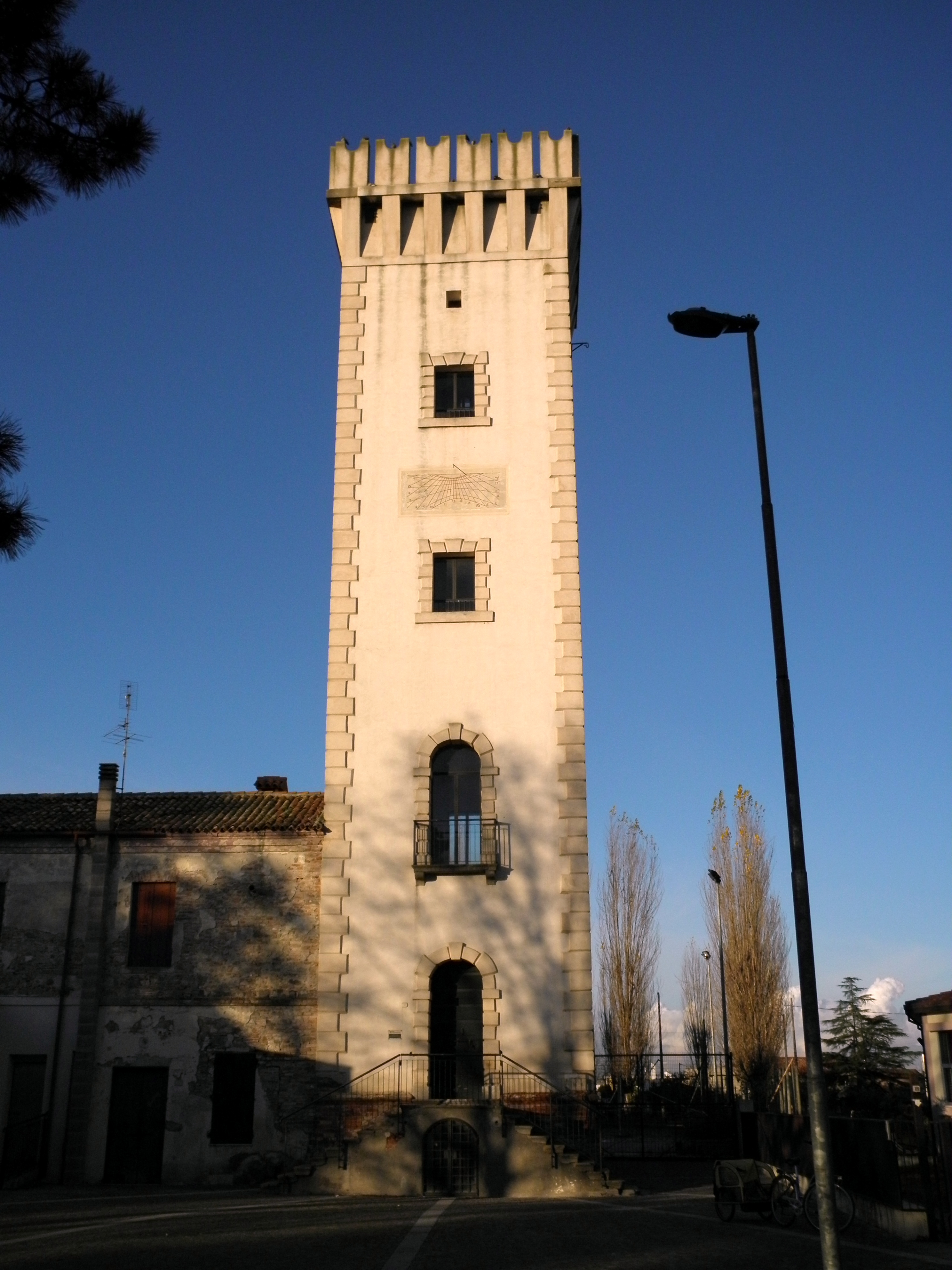 Tribano, la Torre civica.